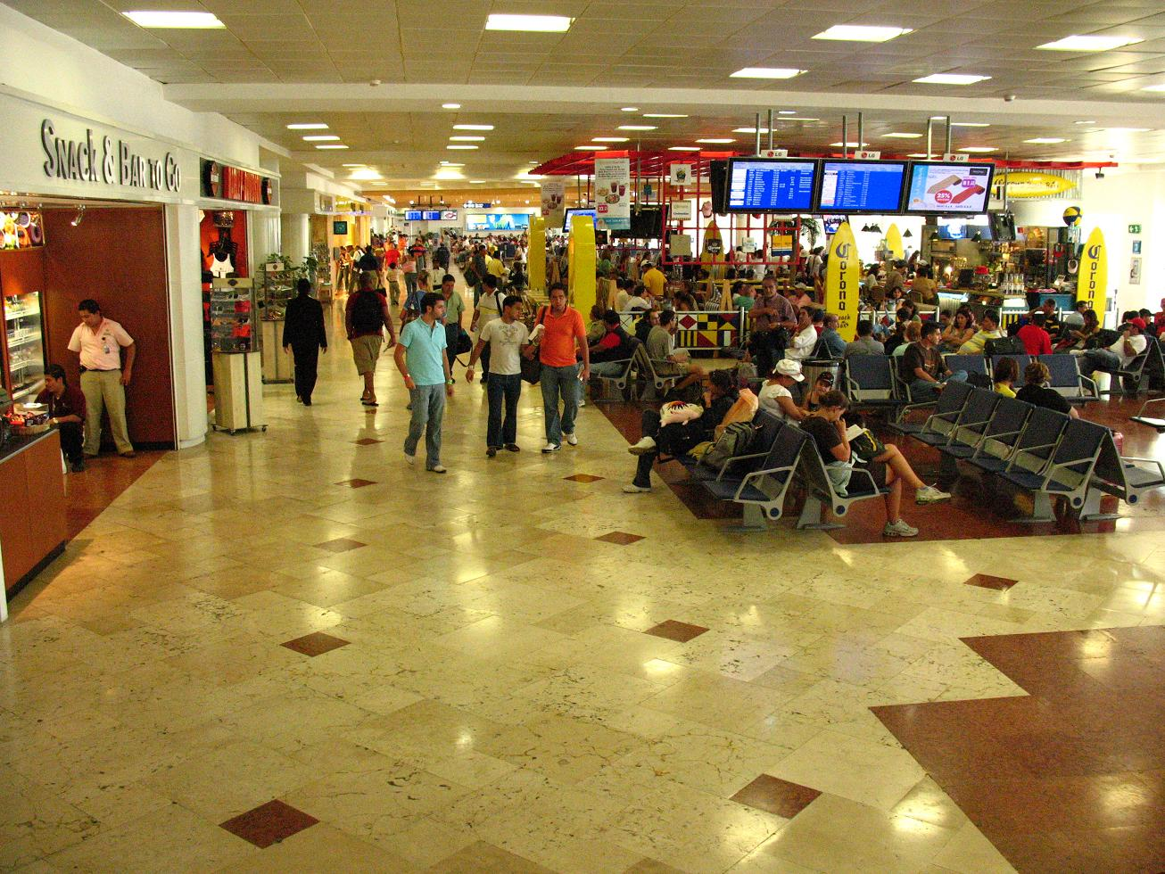 Sala de embarque del aeropuerto de Cancún